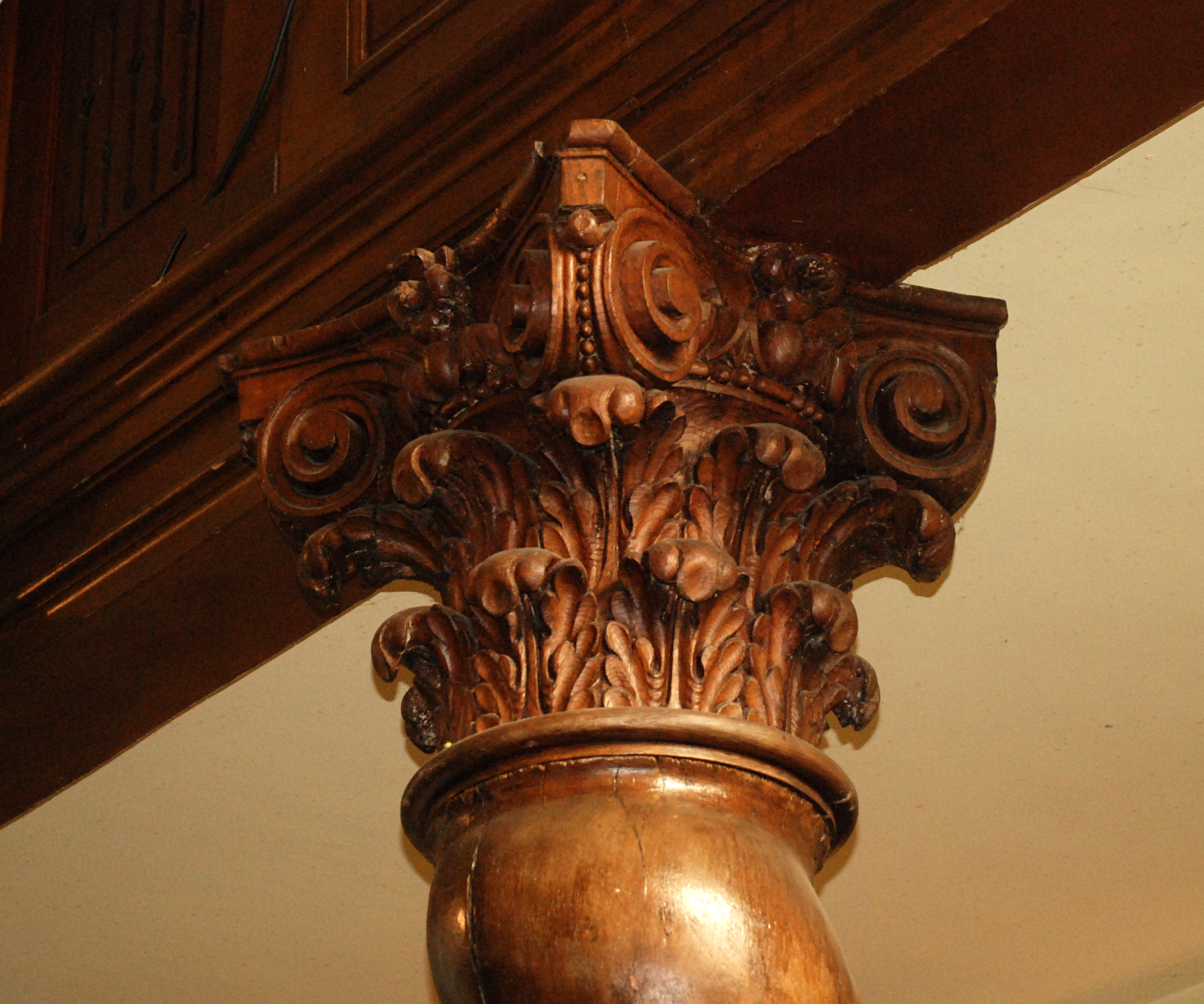 Belgique - Brabant wallon - Mont-Saint-Guibert - Église Saint-Guibert